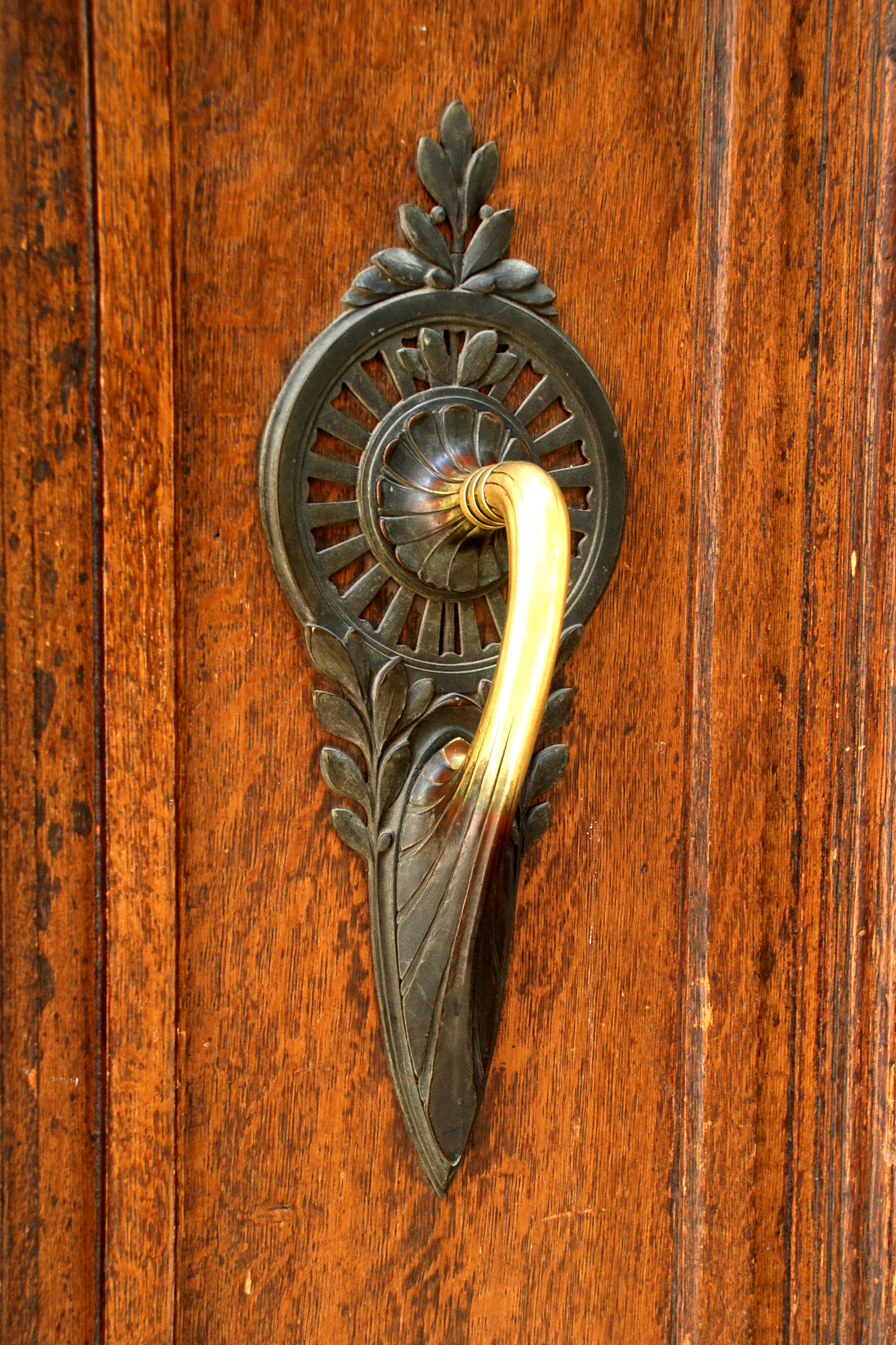 Belgique - Bruxelles - Maison Govaerts